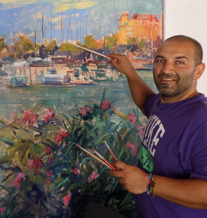 Художникът Иван Русев рисува на живо пристанището в Груисан, Южна Франция